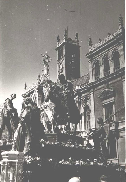 Plaza Mayor - Valladolid - Fotografía de la Plaza Mayor. Procesión de las Palmas. Borriquilla. - Fotografía 75 x 105 mm B/N